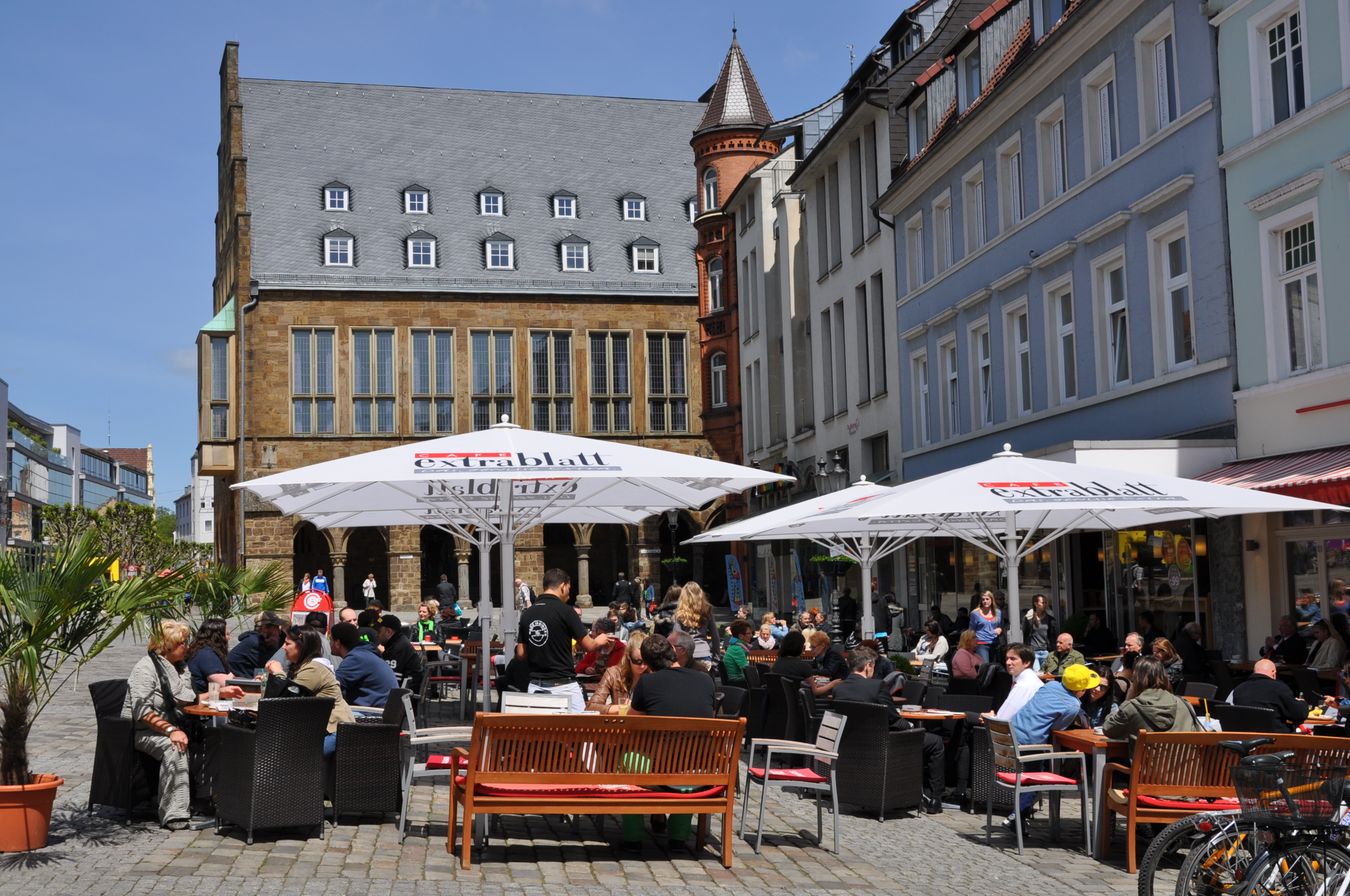 Der Mindener Marktplatz mit dem Rathaus.